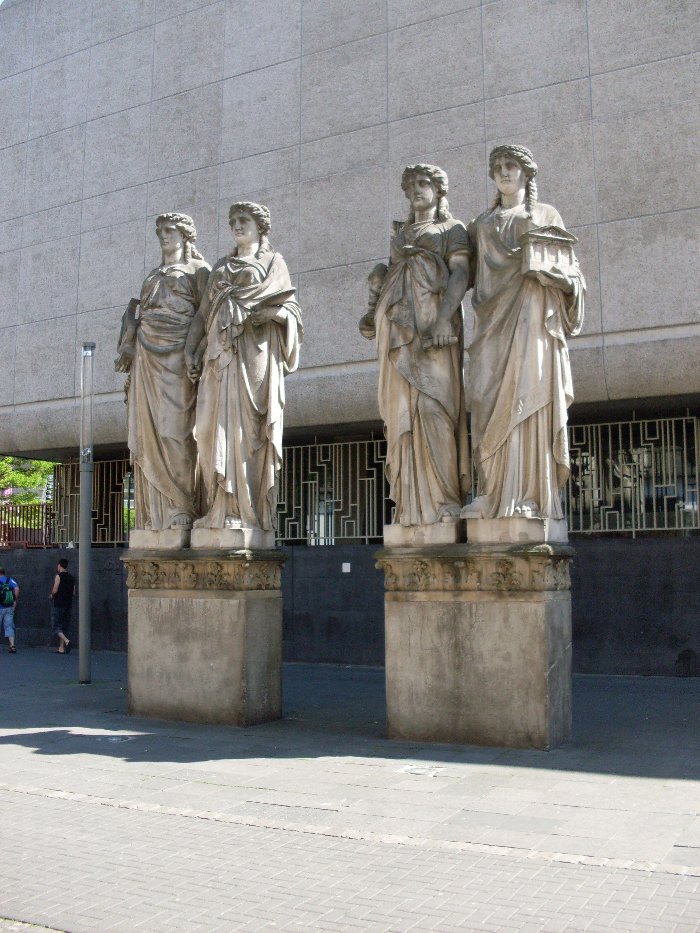 Kunsthalle Düsseldorf, Karyatidenfiguren von Wilhelm Albermann (Rest der alten Kunsthalle)